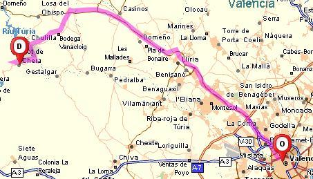 Acceso 1 para llegar a Sot de Chera (Valencia, España)